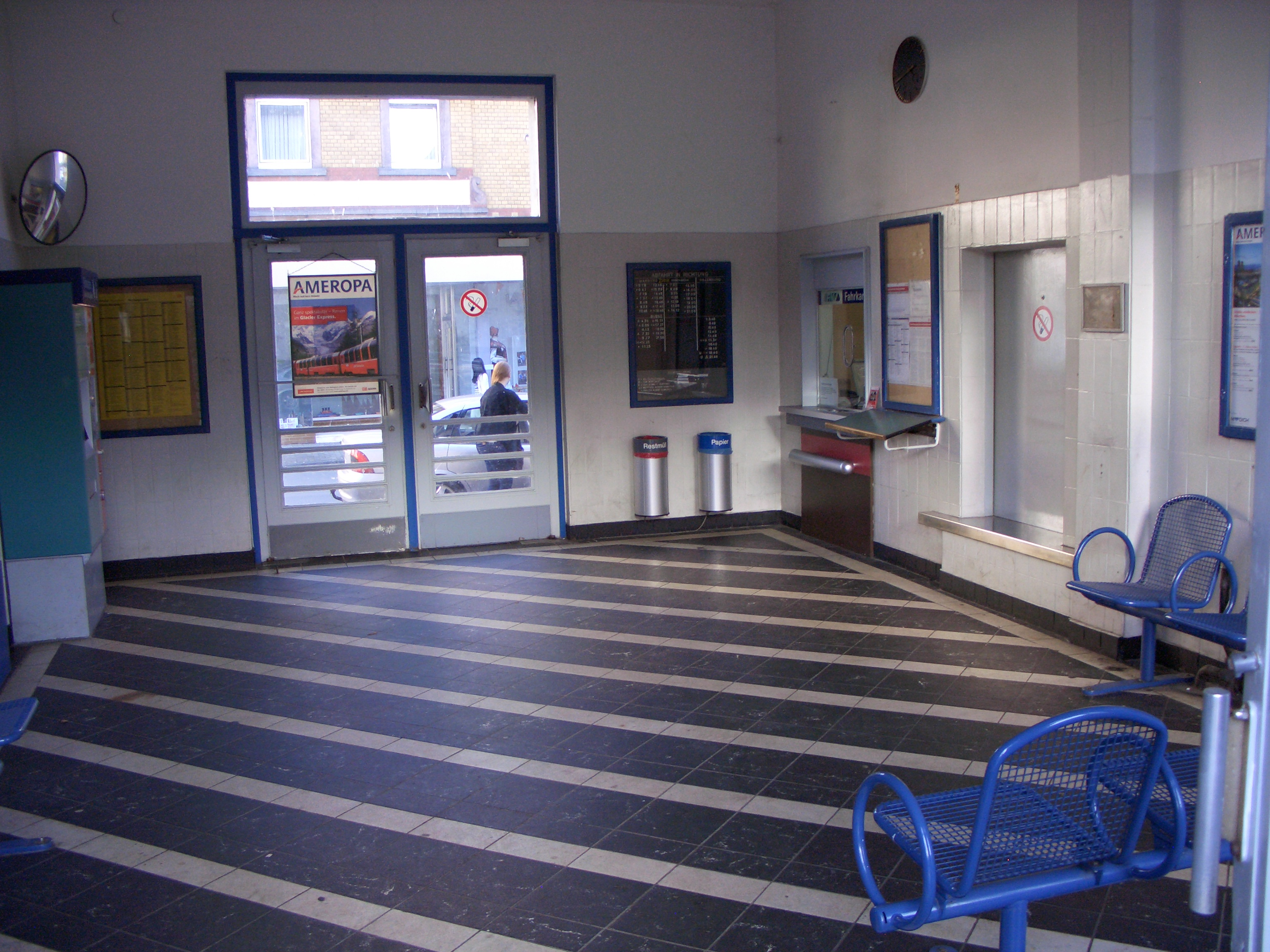 Die Wartehalle im Empfangsgebäude mit Fahrkartenschalter. In der Mitte ist der Ausgang zur Straße zu sehen.